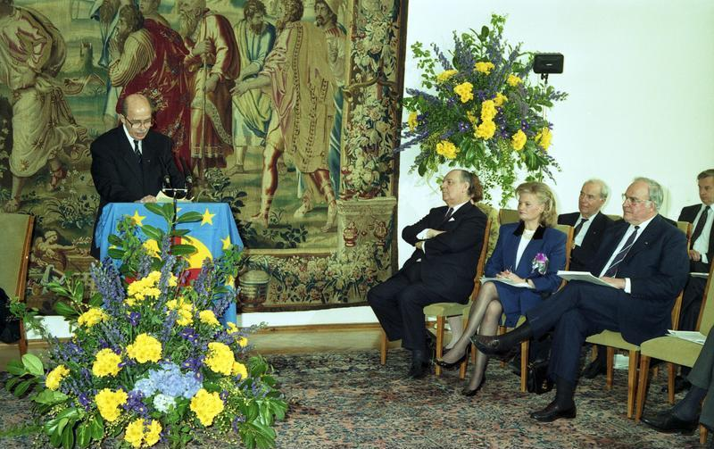 Bonn, 29.4.1991 Für überragende Leistungen in der Europapolitik, für die erfolgreiche deutsche Wiedervereinigung und als Motor der gesamteuropäischen Einigung wurde Bundeskanzler Dr. Helmut Kohl während einer Feierstunde im Palais Schaumburg mit dem Coudenhove-Kalergi-Preis ausgezeichnet. Der Präsident der Paneuropa-Union, Europaabgeordneter Otto von Habsburg und der Präsident der Coudenhove-Kalergi-Stiftung, Gerard Bauer, überreichten dem Bundeskanzler in Anwesenheit des ehemaligen französischen Premierminister, Raymond Barre, den Coudenhove-Kalergi-Preis.